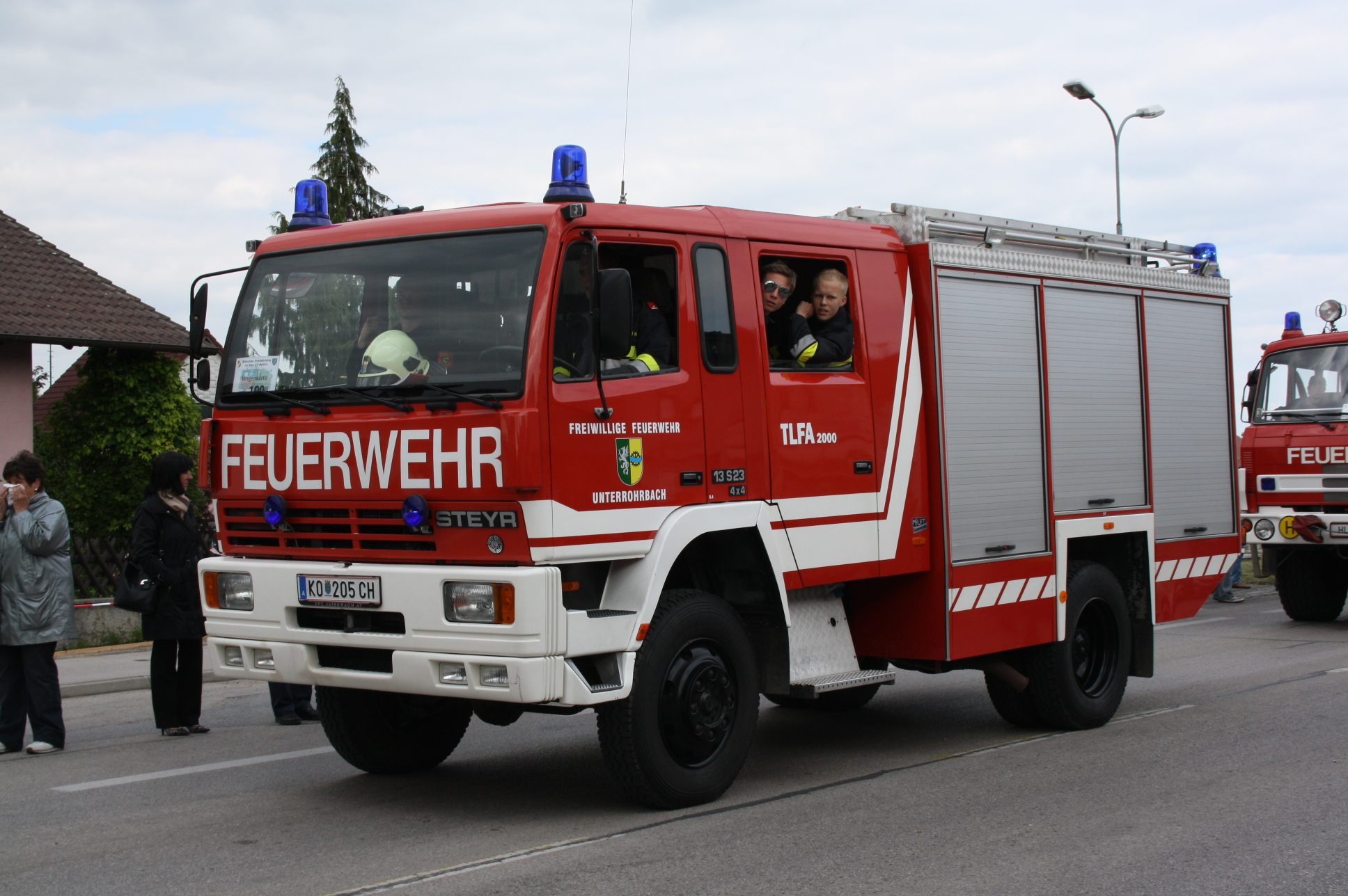 Einsatzfahrzeug der Feuerwehr Unterrohrbach (Gemeinde Leobendorf)